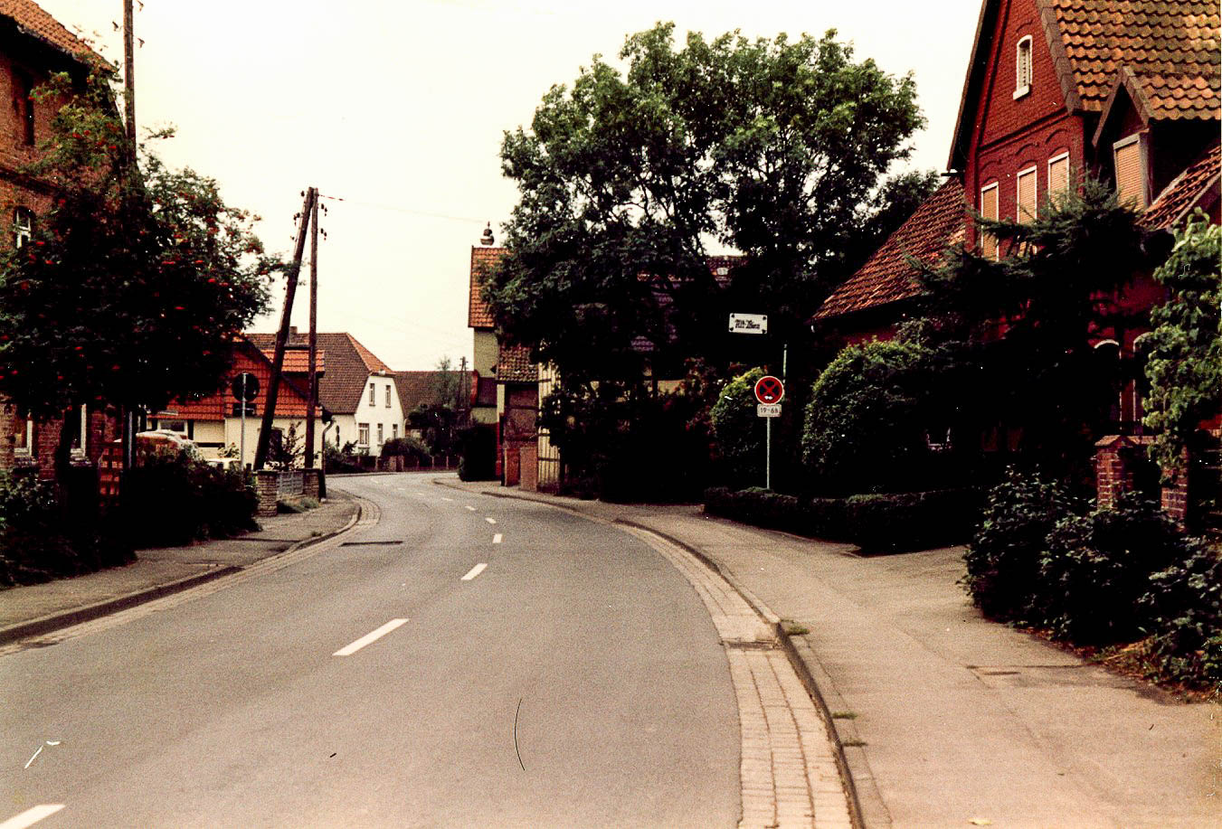 Hemmingen, Döhrener Straße (1984)